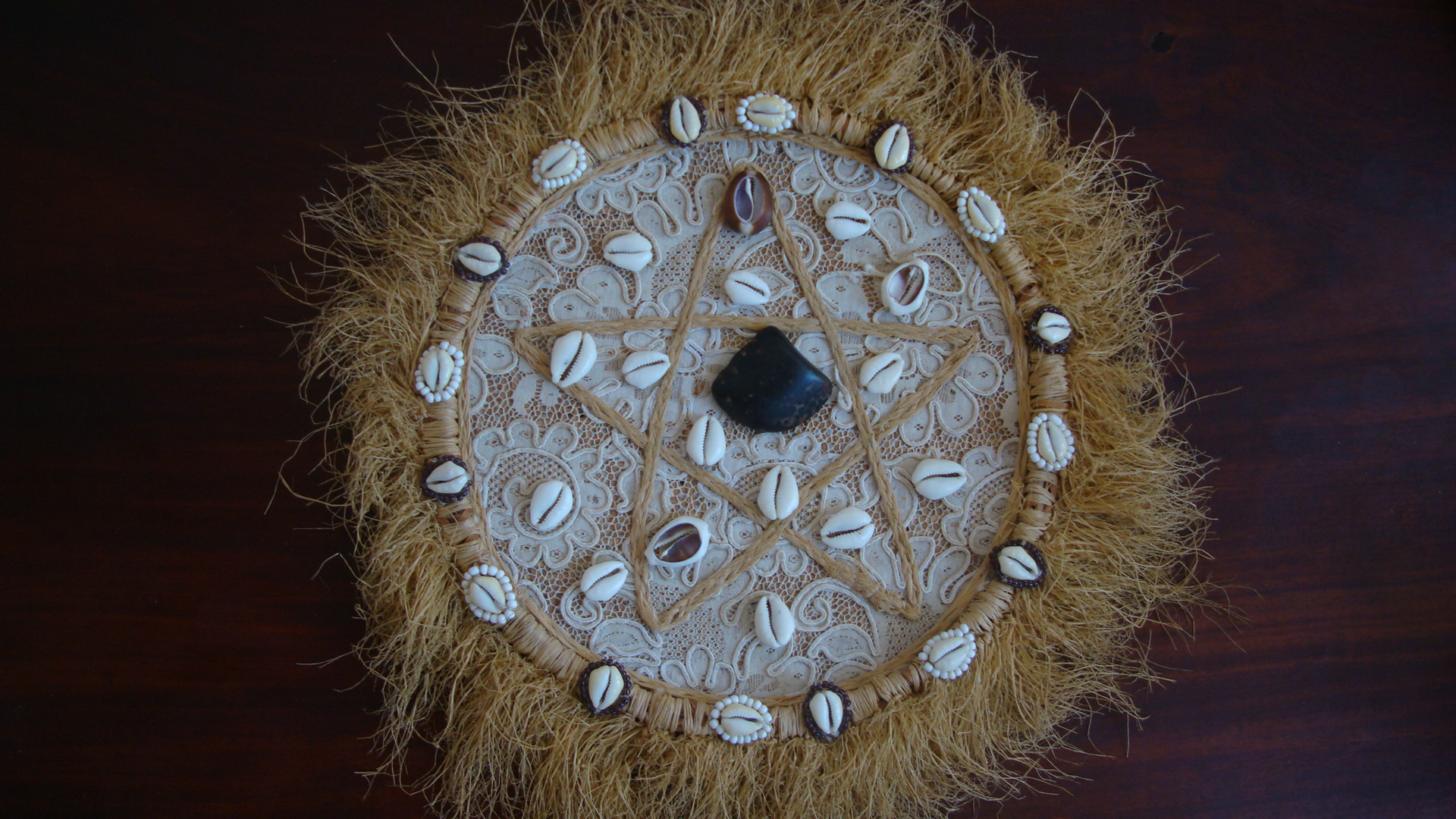 Odu Êjilobon Merindilogun, Salvador, Bahia, Brasil.